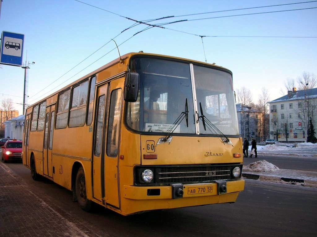 Икарус 263 седьмого маршрута на вокзальной площади